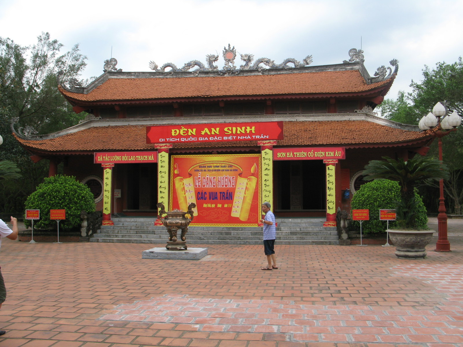 Đền An Sinh thuộc Khu di tích nhà Trần ở Thị xã Đông Triều, Quảng Ninh thờ 8 vị vua nhà Trần